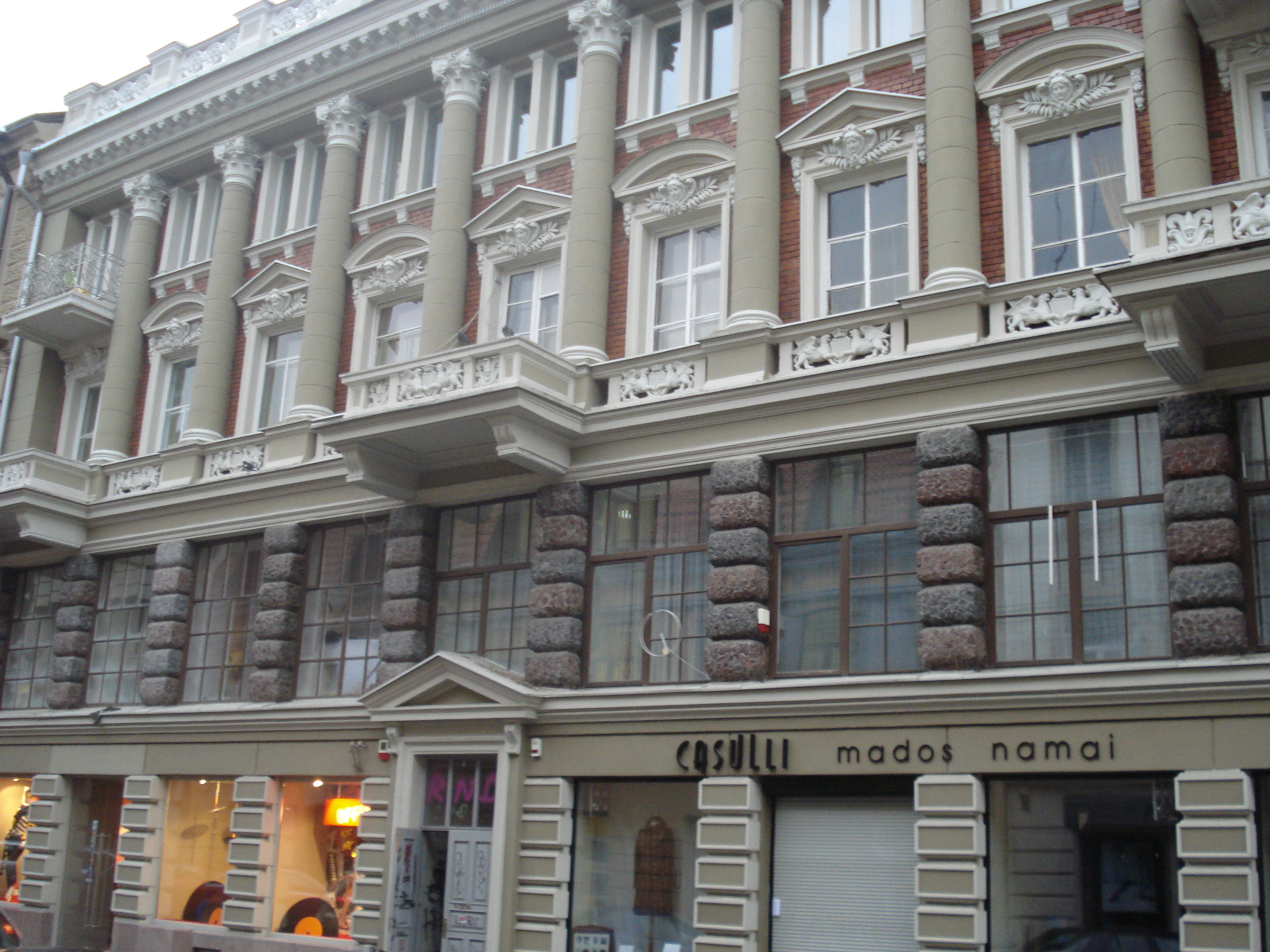 House of Julian Januszewski (1898) in Vilnius (Vilniaus g. 21)